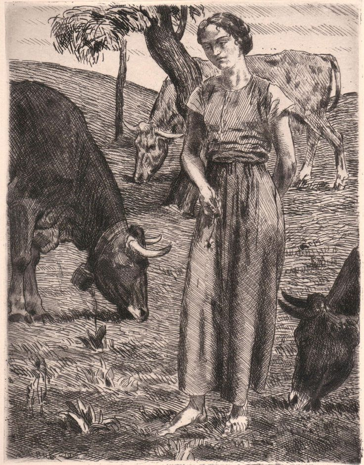 Die Hirtin